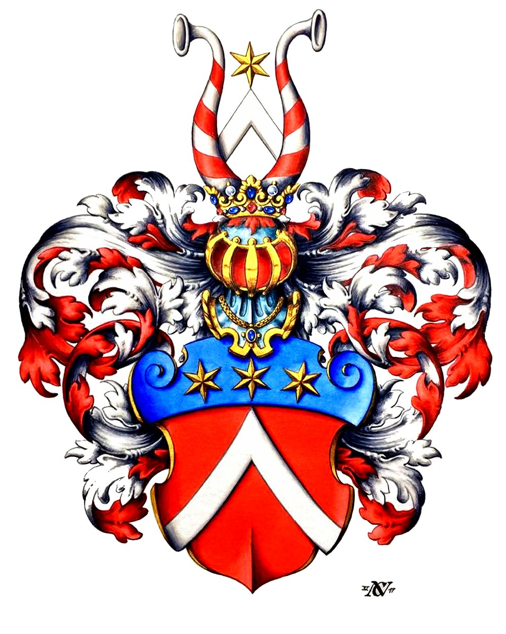 Stammwapen der Schneller zu Lottstetten